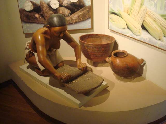 Conjunto que representa a una aborigen nicoyana moliendo maíz con un metate de piedra. Se pueden observar vasijas precolombinas de cerámica policromada propias de la Gran Nicoya. El maíz, la yuca y otros tubérculos fueron base de la alimentación de los indígenas durante el periodo precolombino. Museo del Jade, San José de Costa Rica.